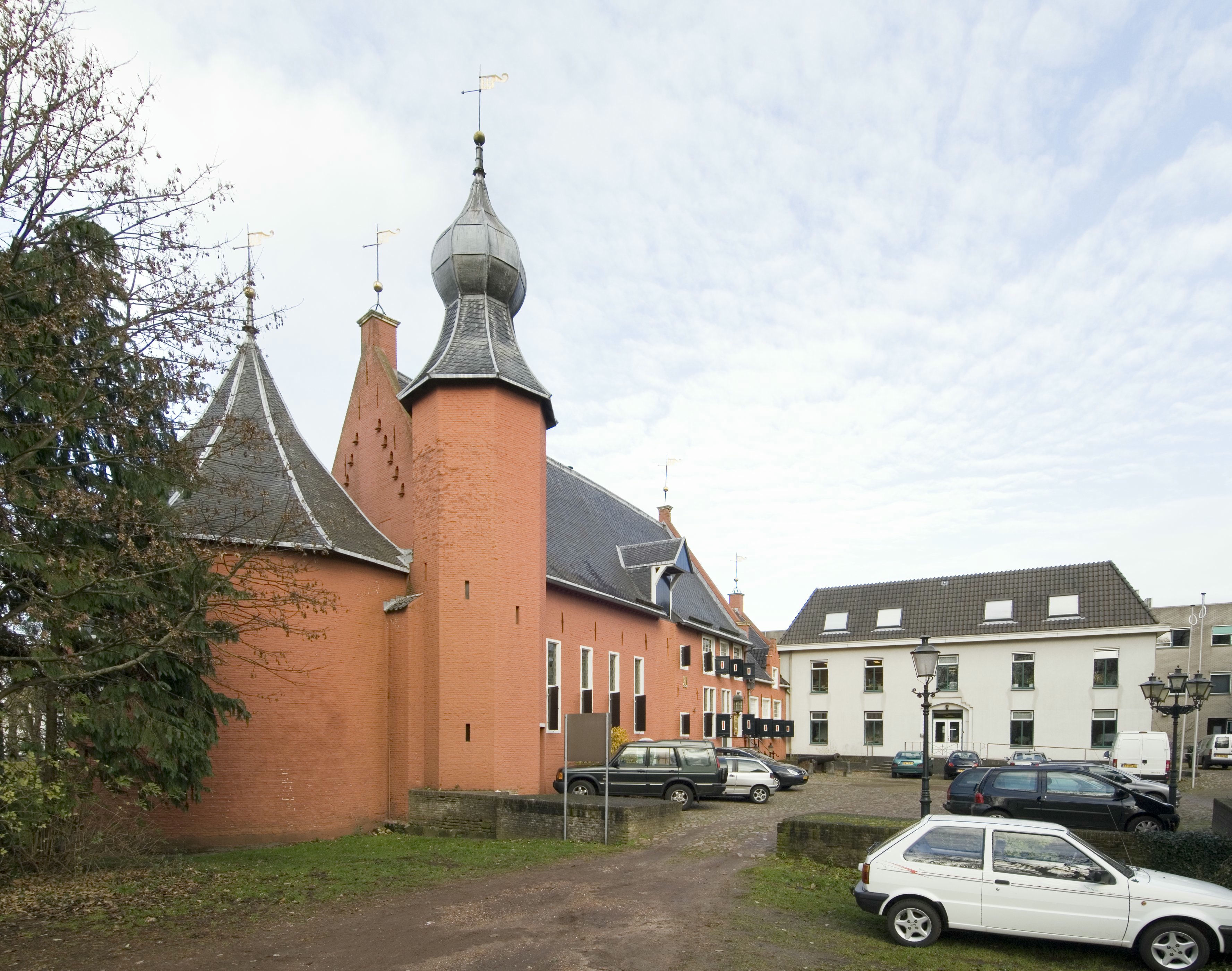 Kasteel/ Traptoren: Kasteel en gemeentehuis (opmerking: Kasteel huisvest momenteel een restaurant en maakt deel uit van het complex van het gemeentehuis)